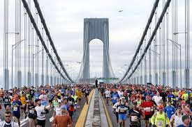 El gran puente Brooklyn, por donde pasan cerca de 50 mil corredores cada año en el más mediático y deseado Maratón de Nueva York.